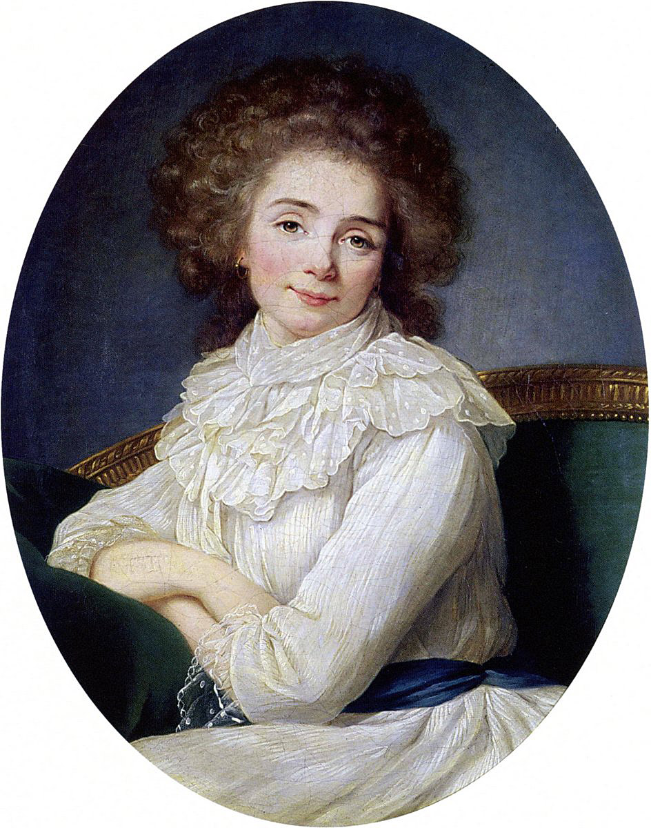 Françoise Eléonore Dejean de Manville, comtesse de Sabran (* 3. März 1749 in Paris; † 27. Februar 1827 in Paris) war eine Persönlichkeit der Pariser Salons. Sie verkehrte unter anderem in dem Salon von Madame Vigée-Lebrun.